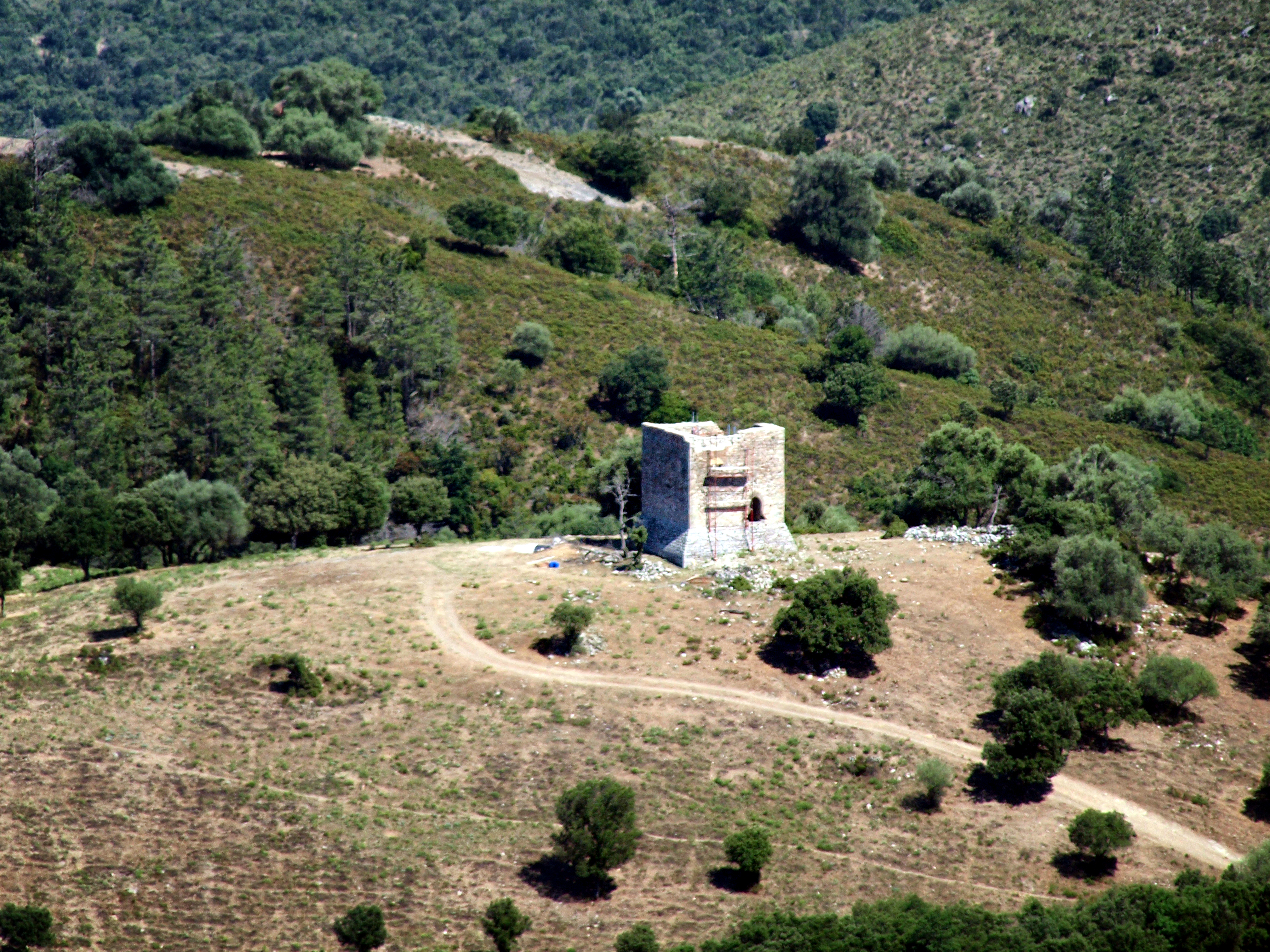 Prato-di-Giovellina, Corse - Tour génoise de Monte Albano